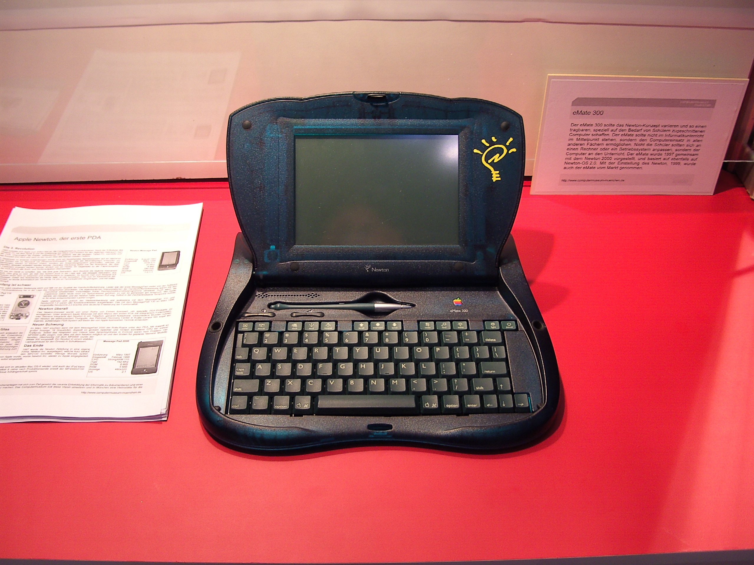 Apple eMate 300